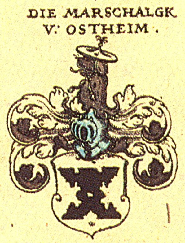 Wappen der fränkischen Adelsfamilie Marschalk von Ostheim (Marschall von Ostheim).